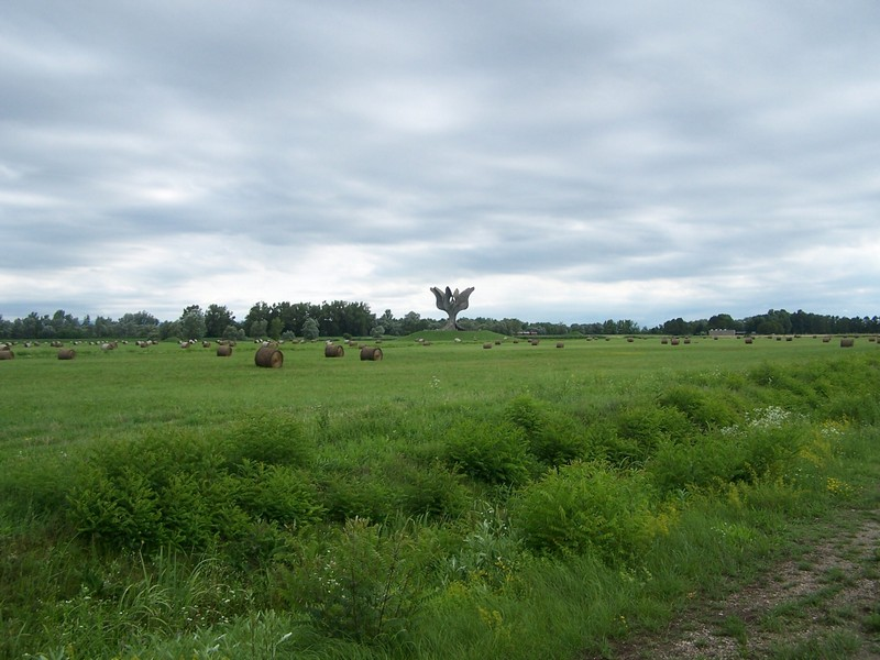 Jasenovac. Denkmal "Steinerne Blume" von Bogdan Bogdanović